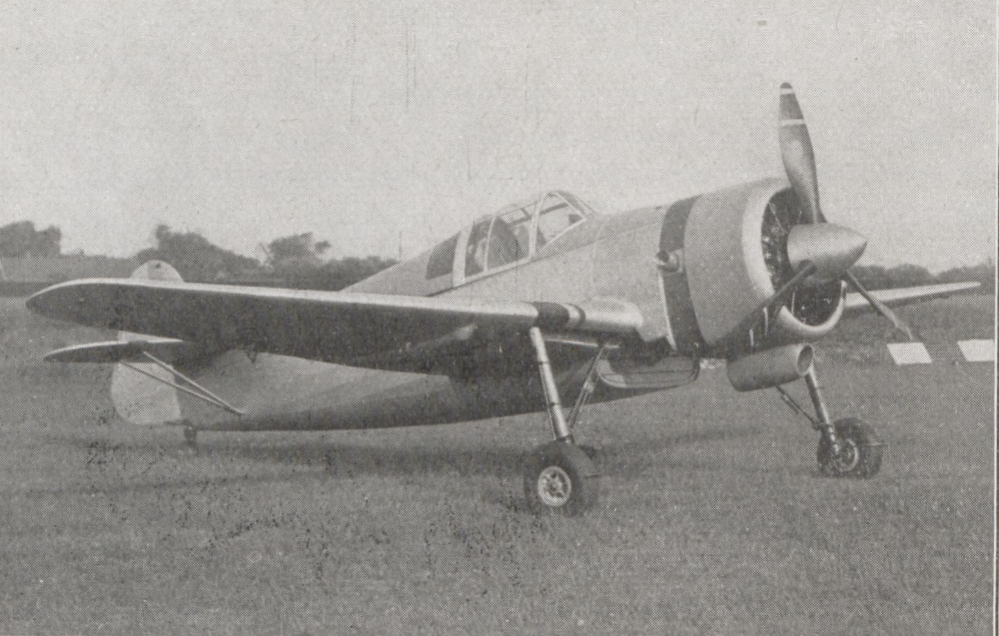 Aspect du monoplace de chasse Koolhoven F.K.58, à moteur HISPANO-SUIZA 14AA10 de 1080ch